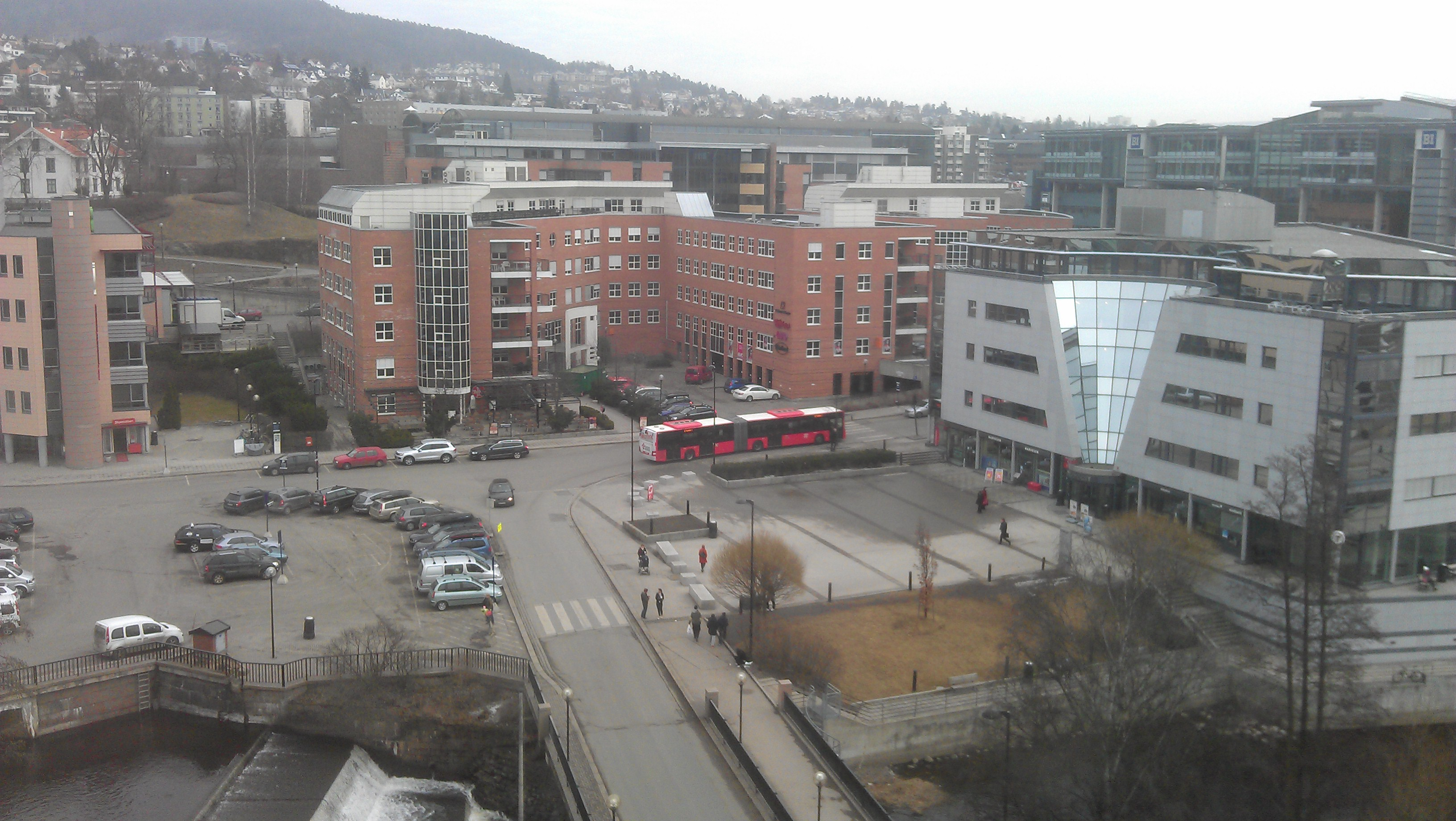 Gullaug Torg i Nydalen i Oslo.